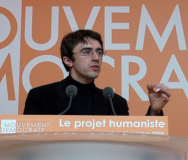 Yann Wehrling à une réunion du Mouvement Démocrate (MoDem)